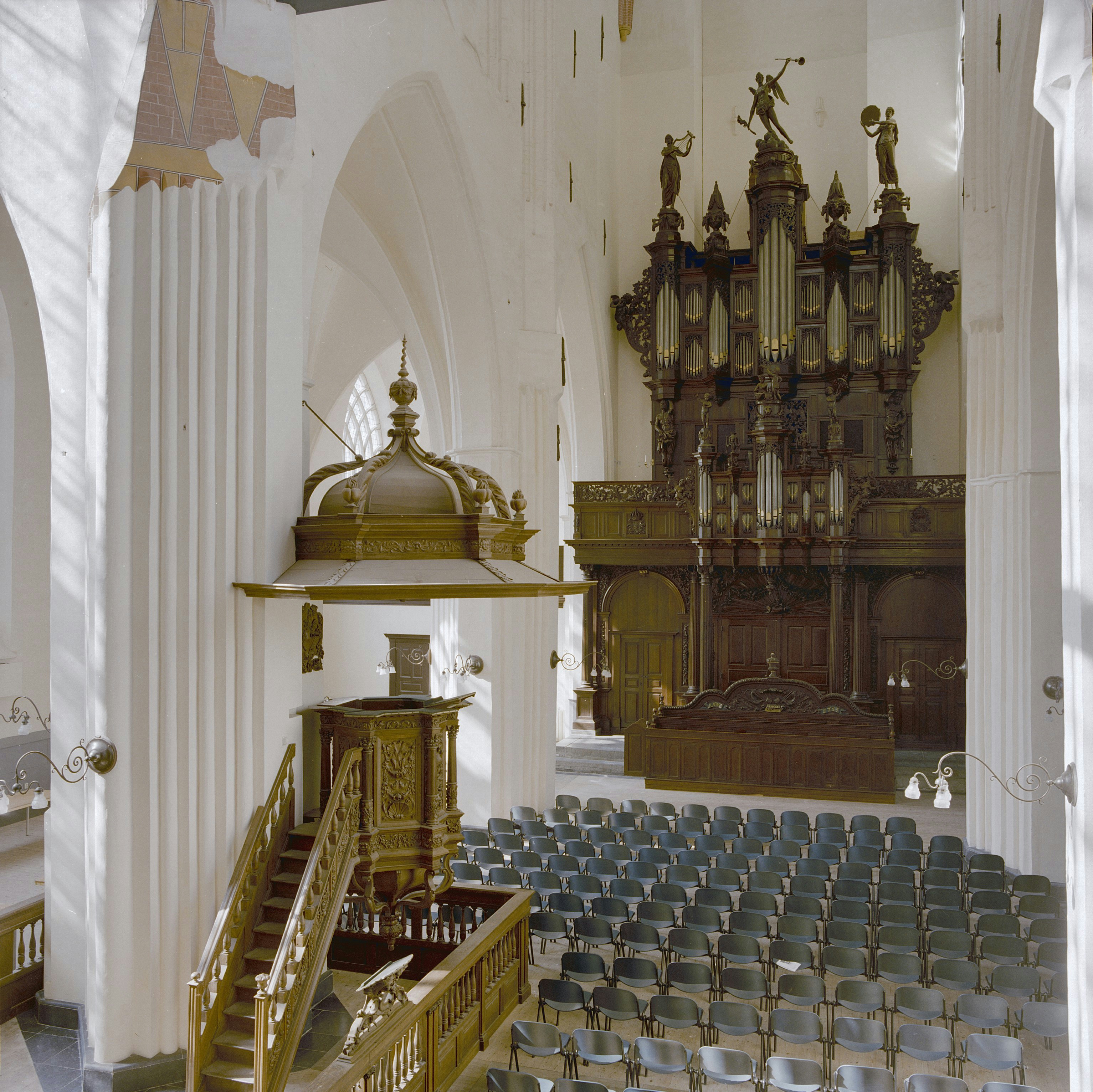 Der Aa-kerk: INTERIEUR, OVERZICHT, PREEKSTOEL, GROTE ORGEL